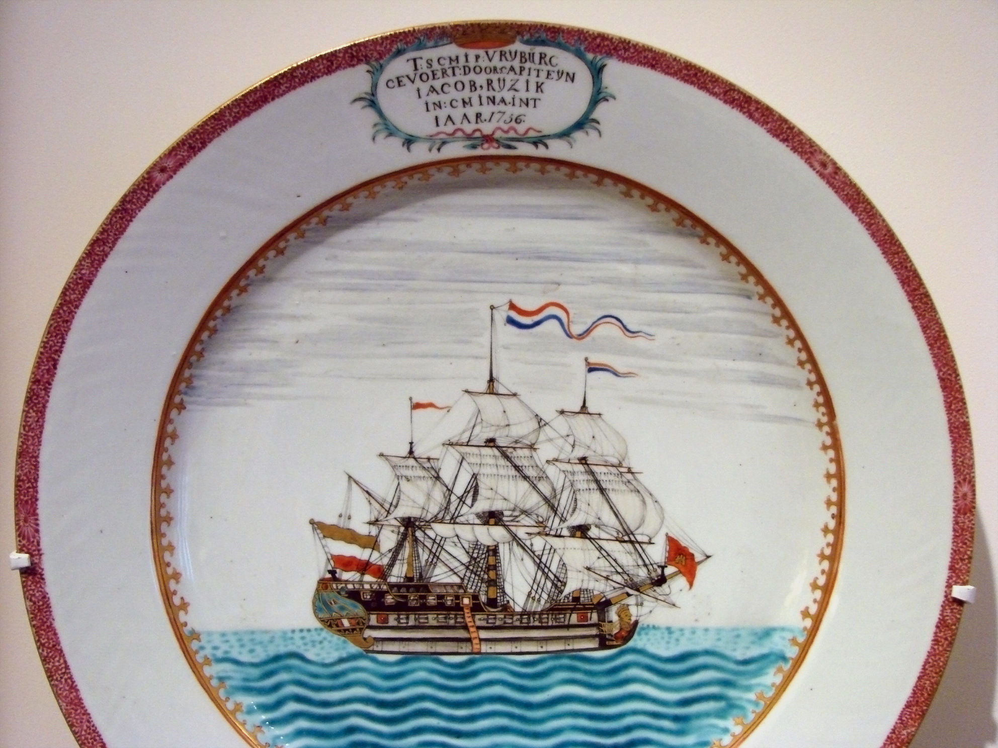 Plat représentant le navire hollandais Vryburg, avec dans un cartouche le nom du navire, le nom du capitaine et la date de 1756. Dynastie Qing, époque Qianlong (1736-1795). Type de pièce commandée par les marins en souvenir de leur voyage, à Canton. Musée Guimet, Paris.